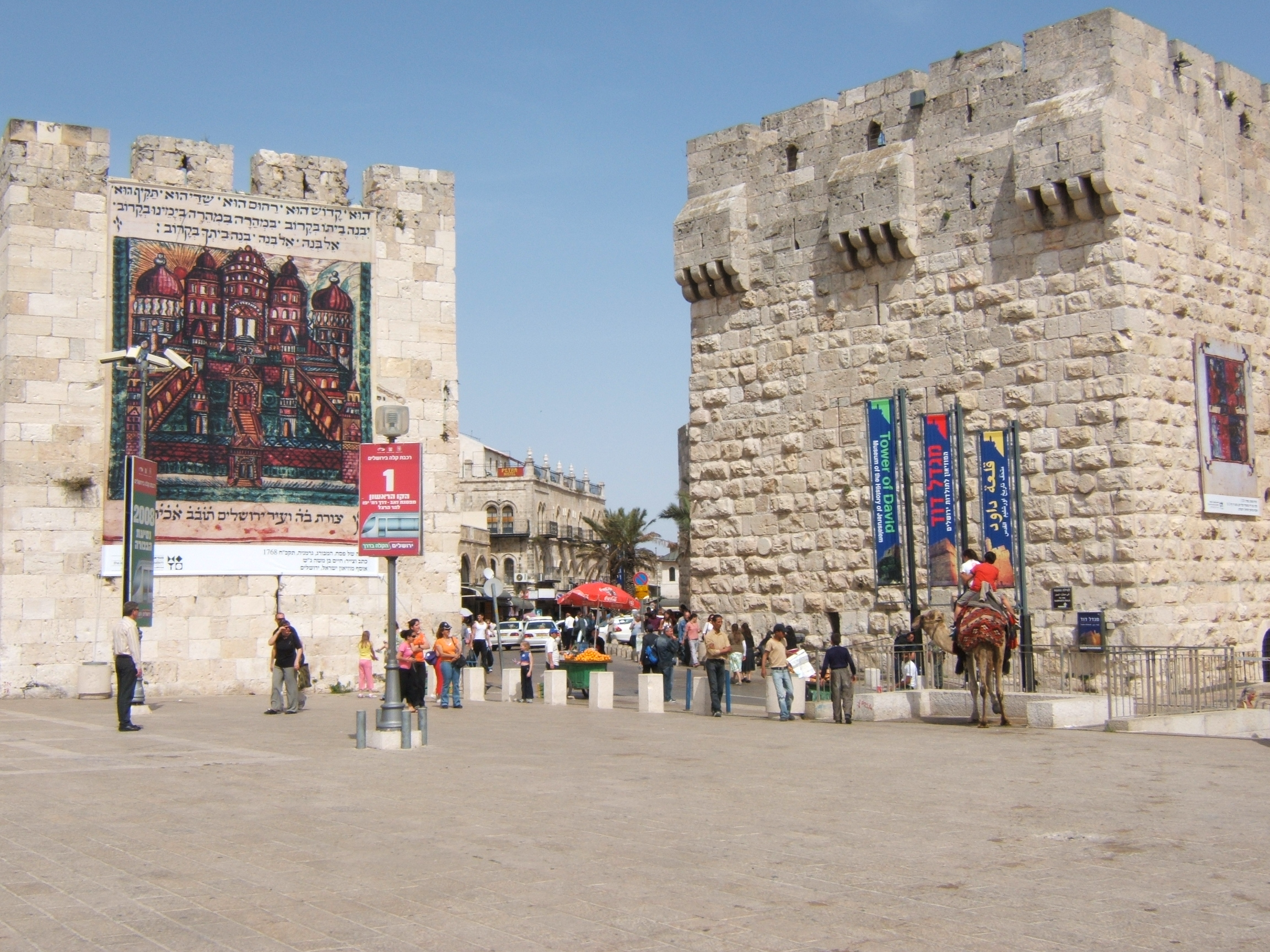 La puerta de Jafa; Jerusalén, Israel.